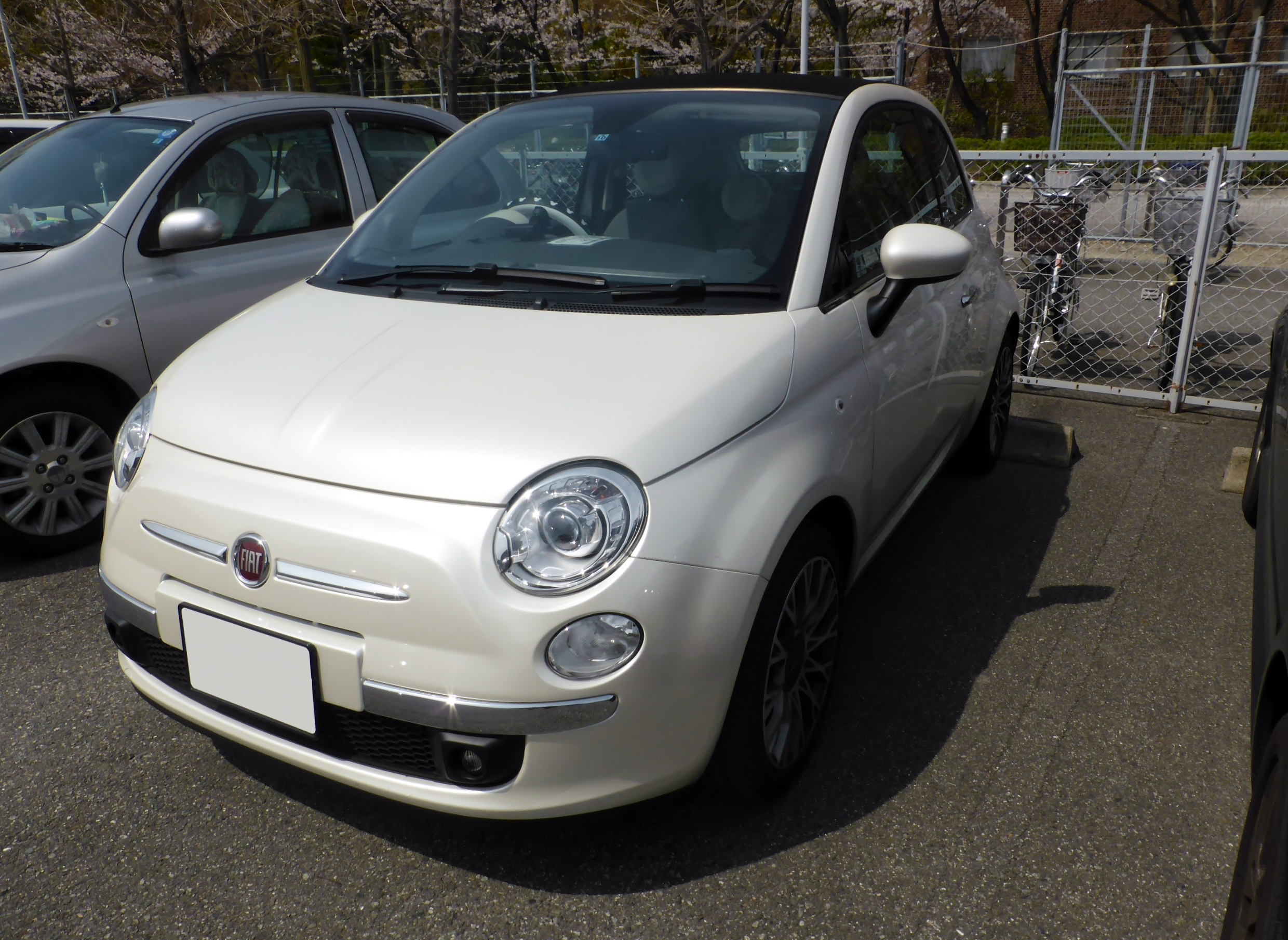 3代目フィアット・500Cをフロントから撮影。